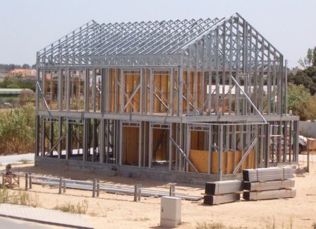 Estrutura de uma moradia em Light Steel Framing com projecto de engenharia da .